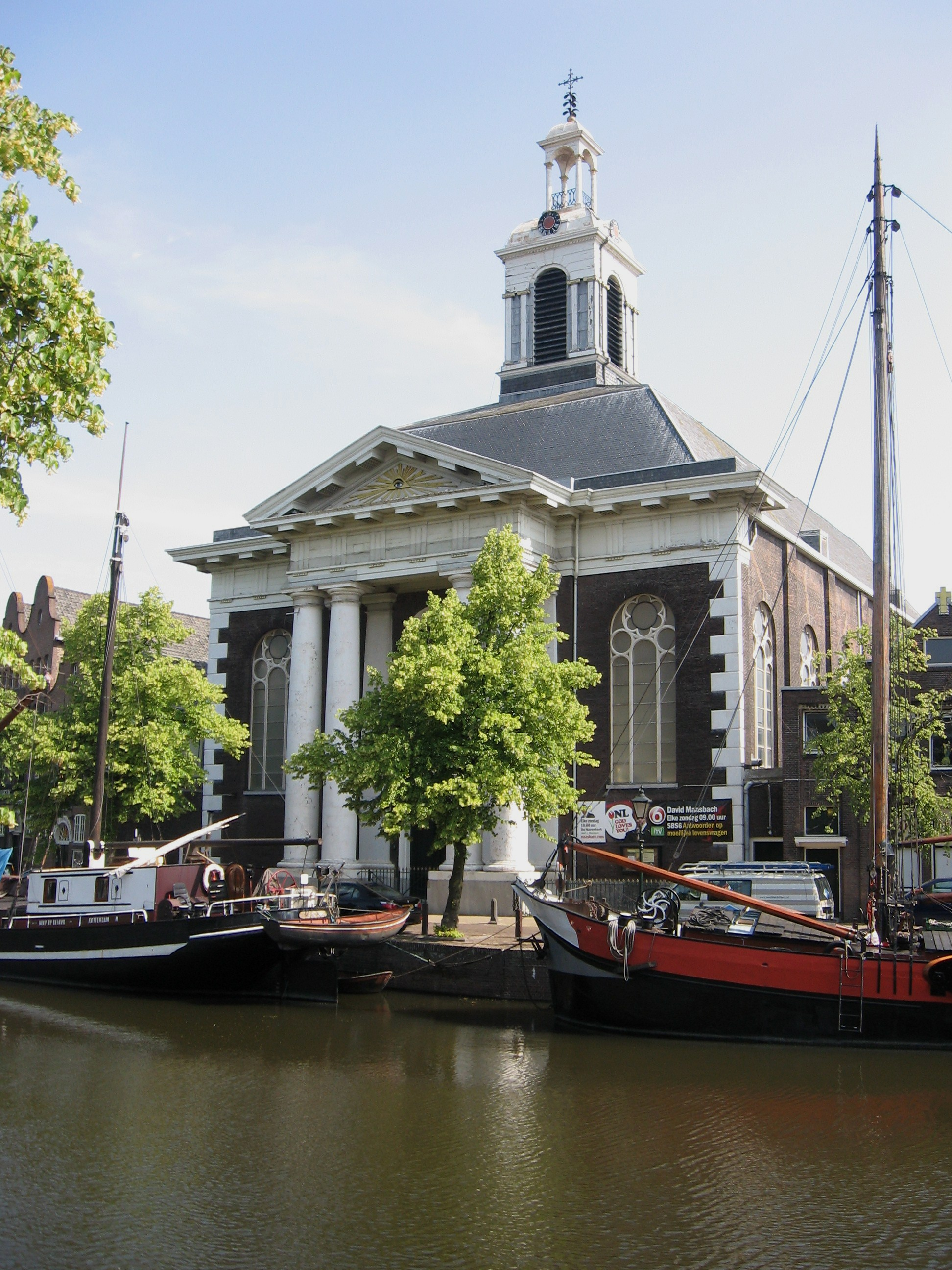 Schiedam - Lange Haven 72.jpg, rijksmonument